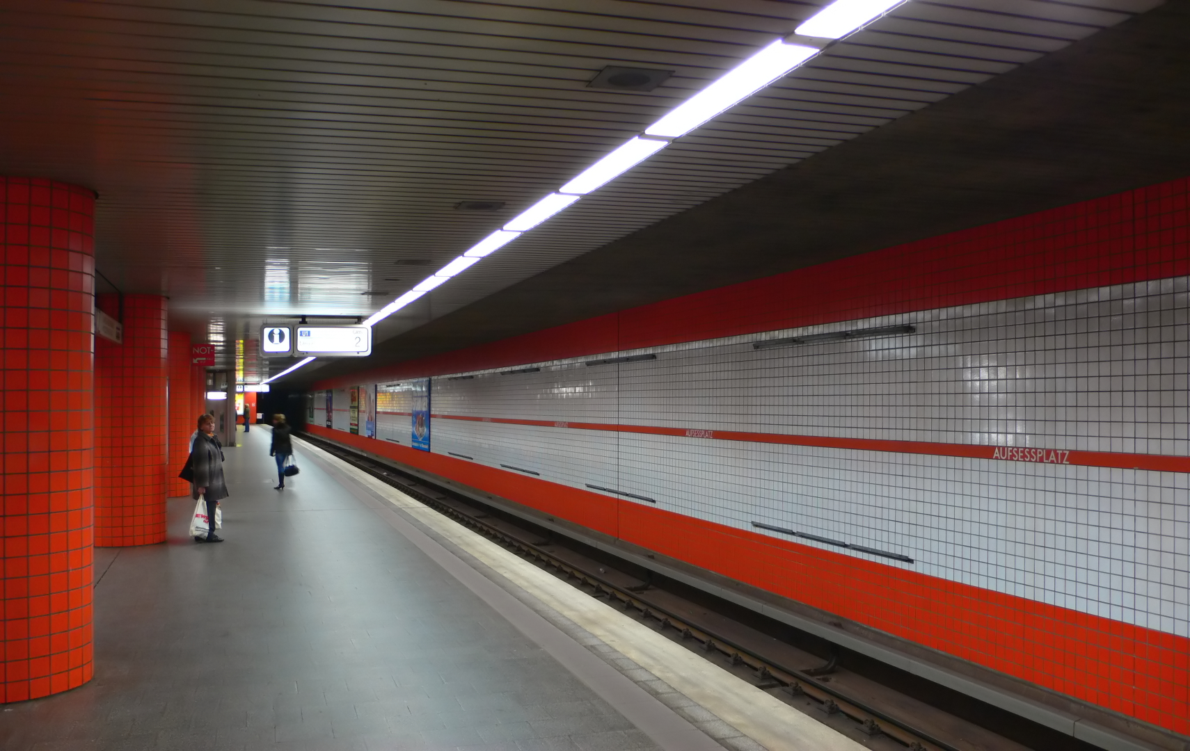 U-Bahnhof Aufseßplatz der U-Bahn Nürnberg, Bahnsteigebene, Blick von Norden